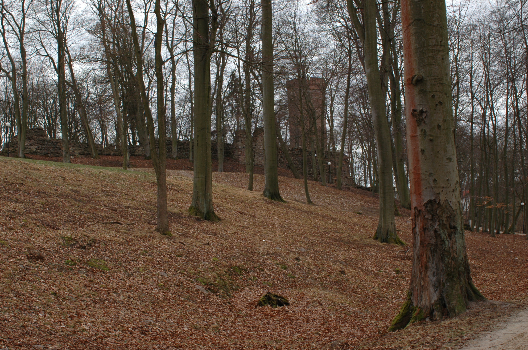 Człuchów - park miejski pn. Lasek Miejski ("Lasek Luizy") wraz z kładką bagienną, XIX